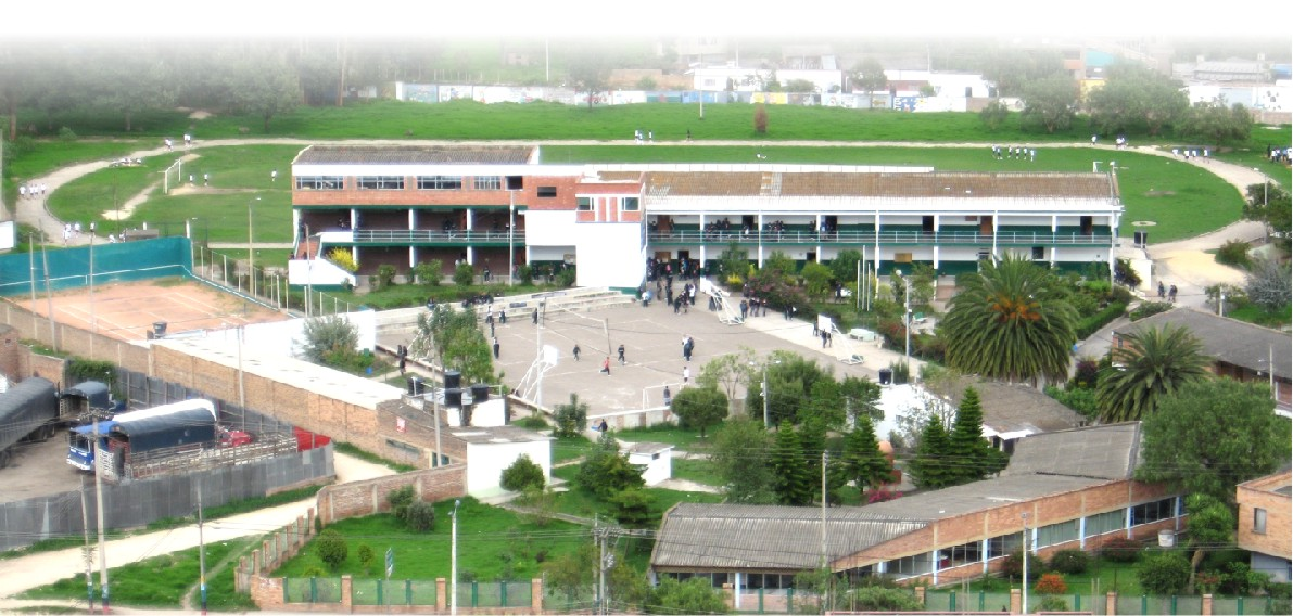 Celebrando Nuestros 60 años